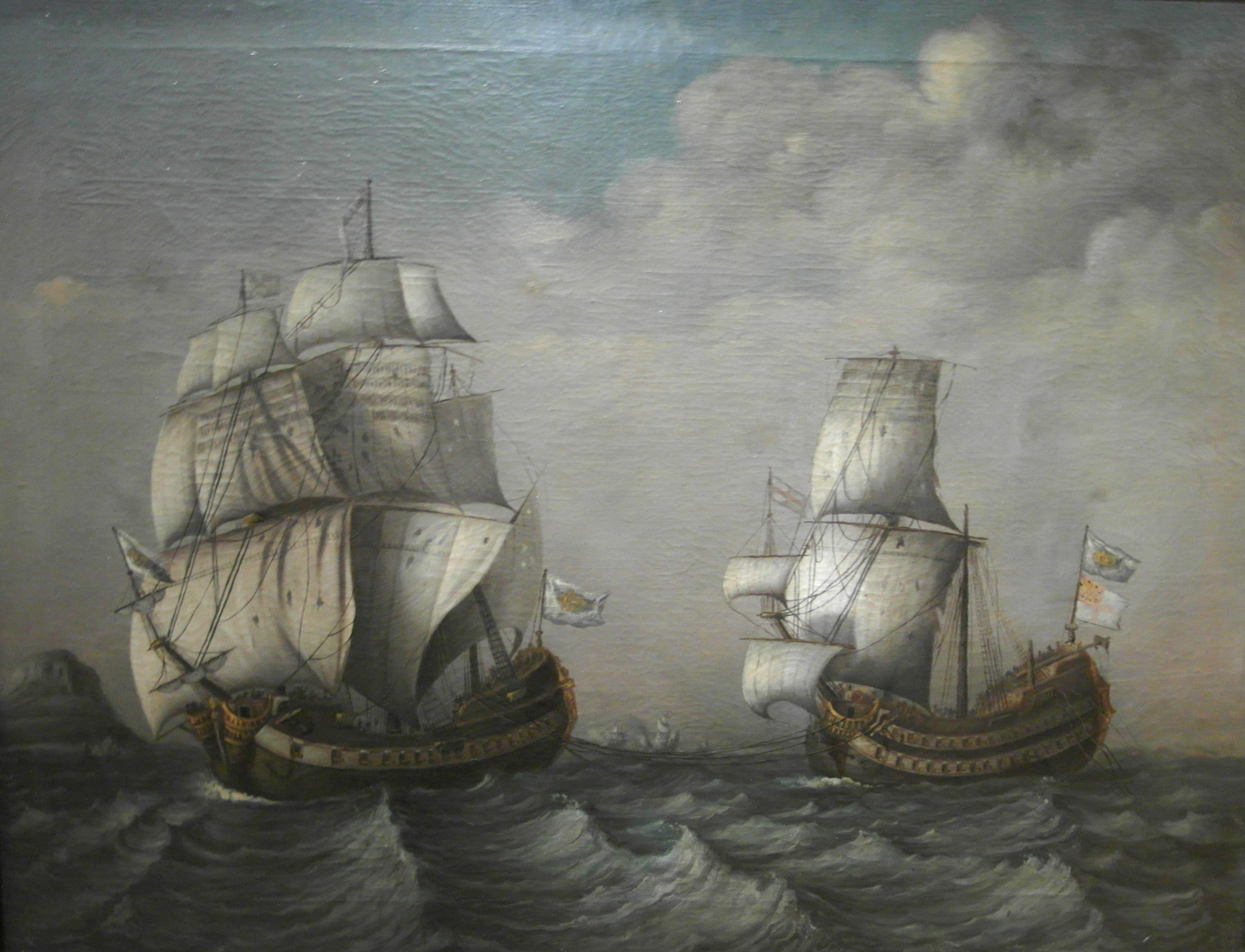 El lienzo representa a la fragata comandada por el marino español Blas de Lezo remolcando, hacia 1710, al navío británico Stanhope.